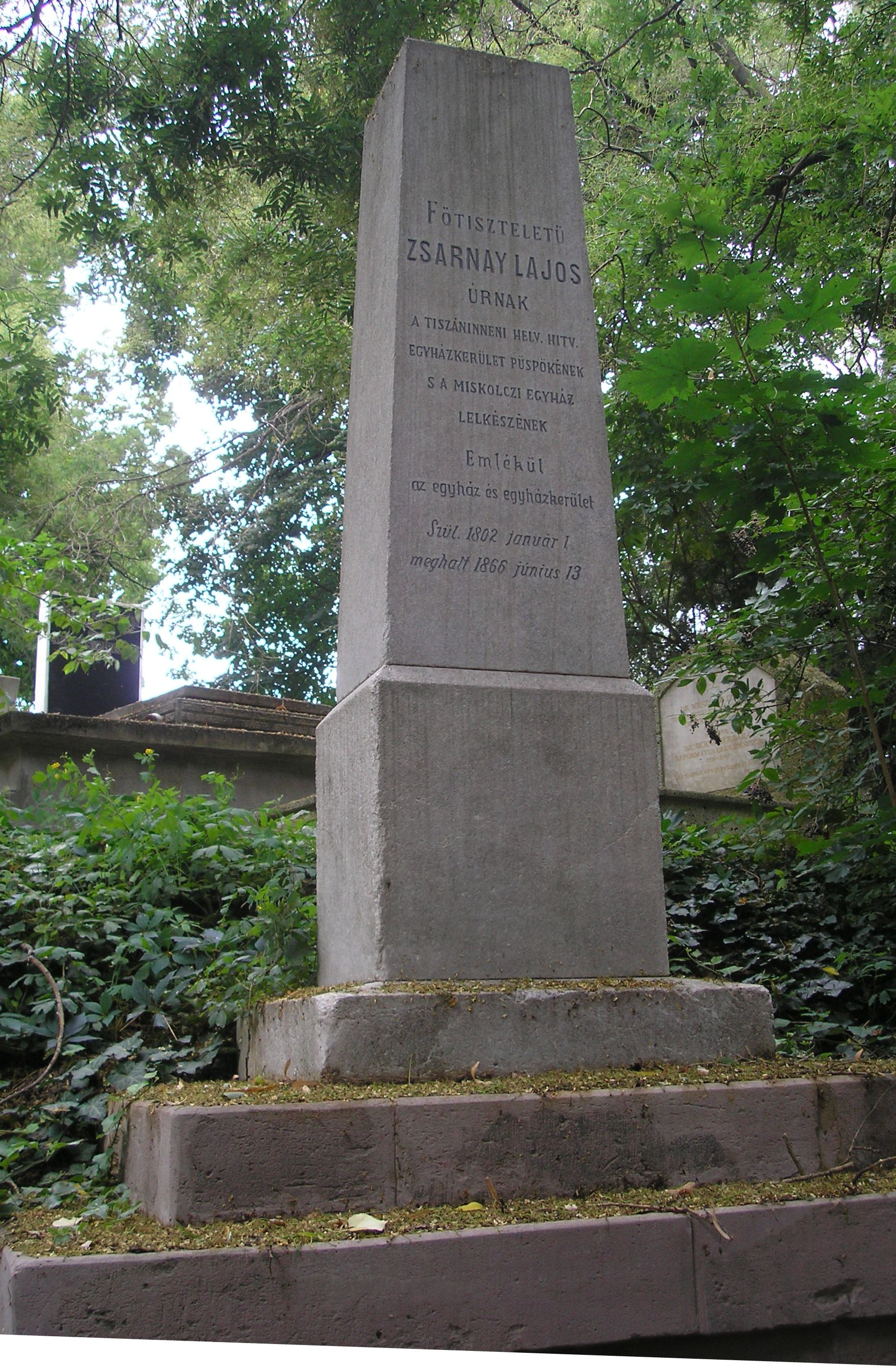 Zsarnay Lajos püspök sírja (Miskolc, Avasi temető)